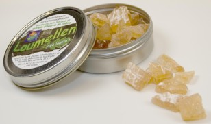 Loumellen an der Metallbécks vun der Bléi vum Séi